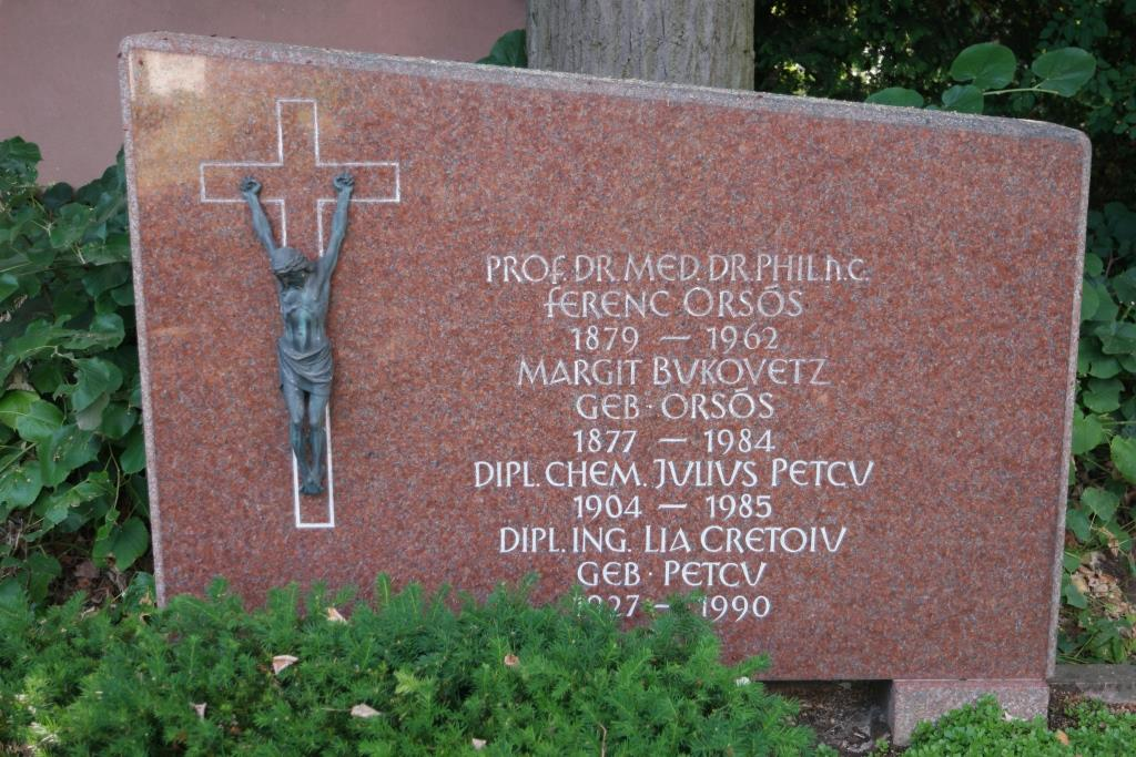 Grab des Rechtsmediziners Ferenc Orsós, 1879-1962, auf dem Hauptfriedhof Mainz